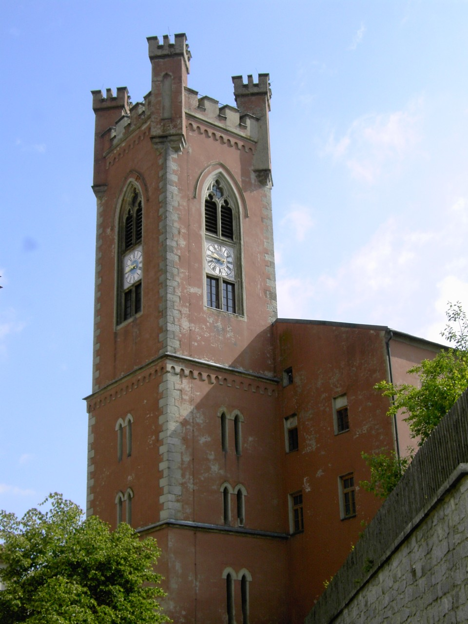 Stadtturm der Stadt Furth im Wald Am 04.06.2006 selbst fotografiert von Labradormix / gemeinfrei